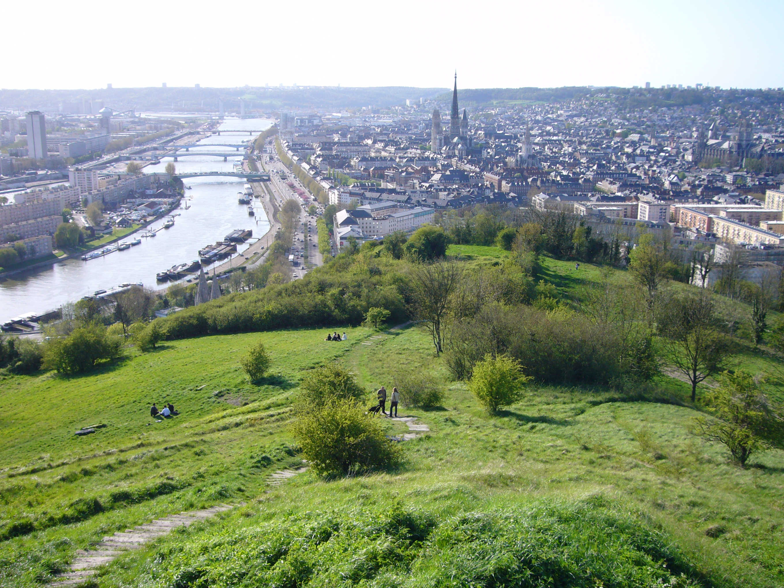 vue panoramique de rouen depuis la Côte Sainte Catherine - Nota : cette photo est une vue de Rouen depuis la commune de Bonsecours, sans rapport avec la commune de Mont-Saint-Aignan, située à plus de trois kilomètres, de l'autre côté de la ville de Rouen